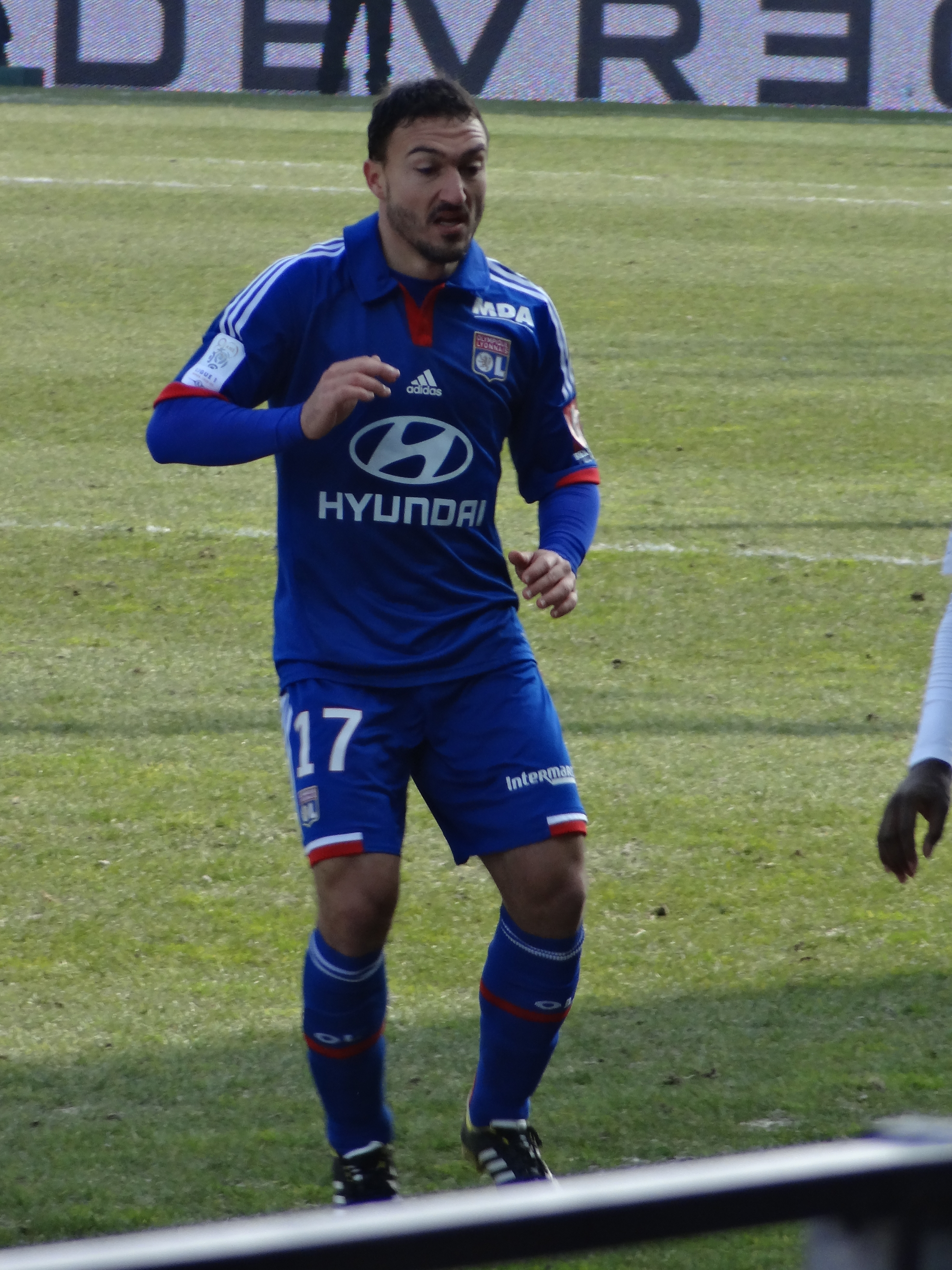 Match de football (Ligue 1) entre le Stade brestois 29 et l'Olympique lyonnais, le 3 mars 2013